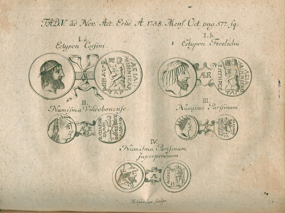 Illustration